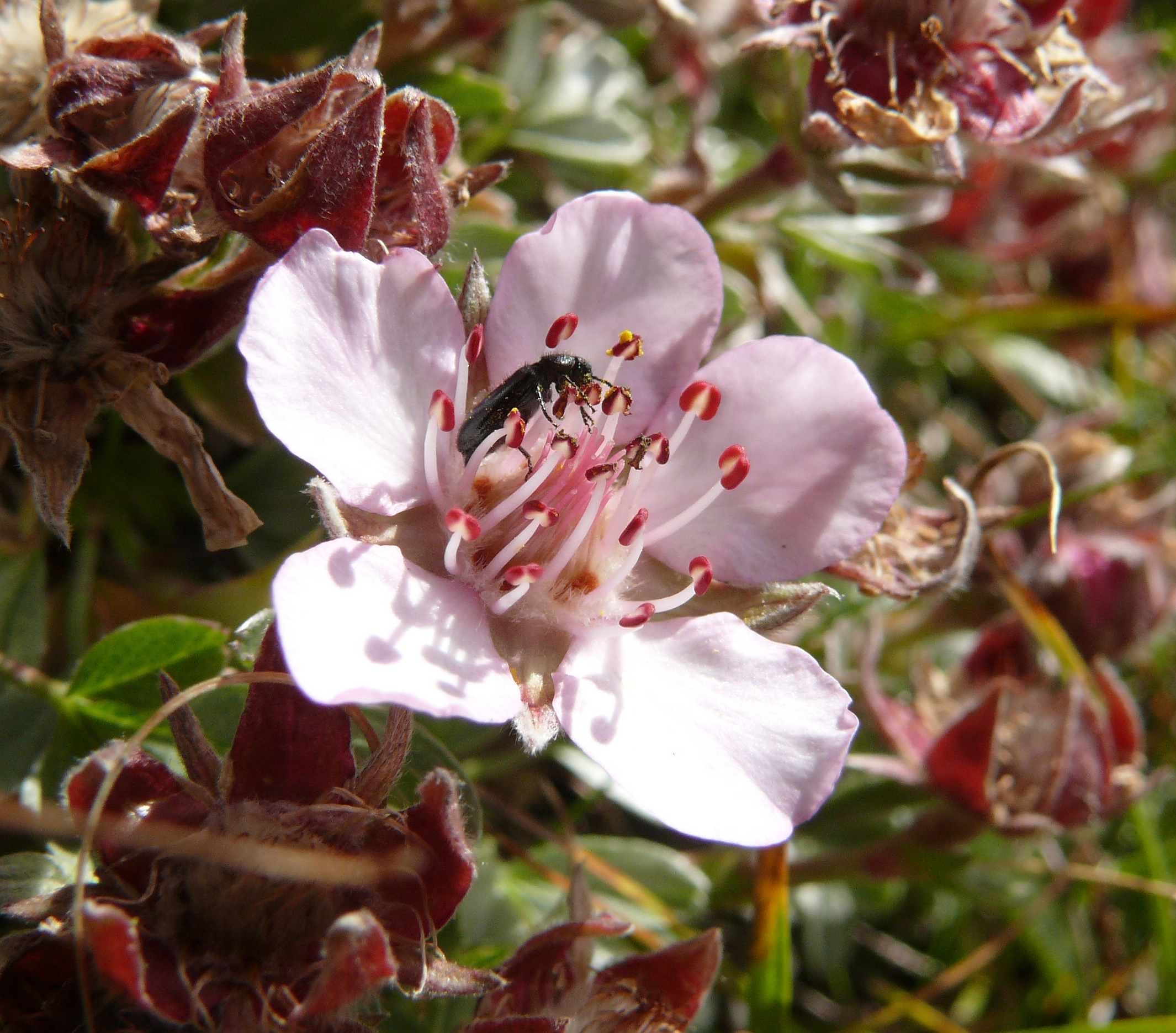 Potentilla nitida, Naturpark Puez-Geisler, Italy